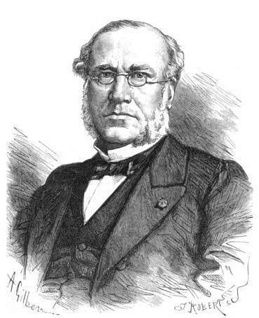 Louis-Olivier Bourbeau